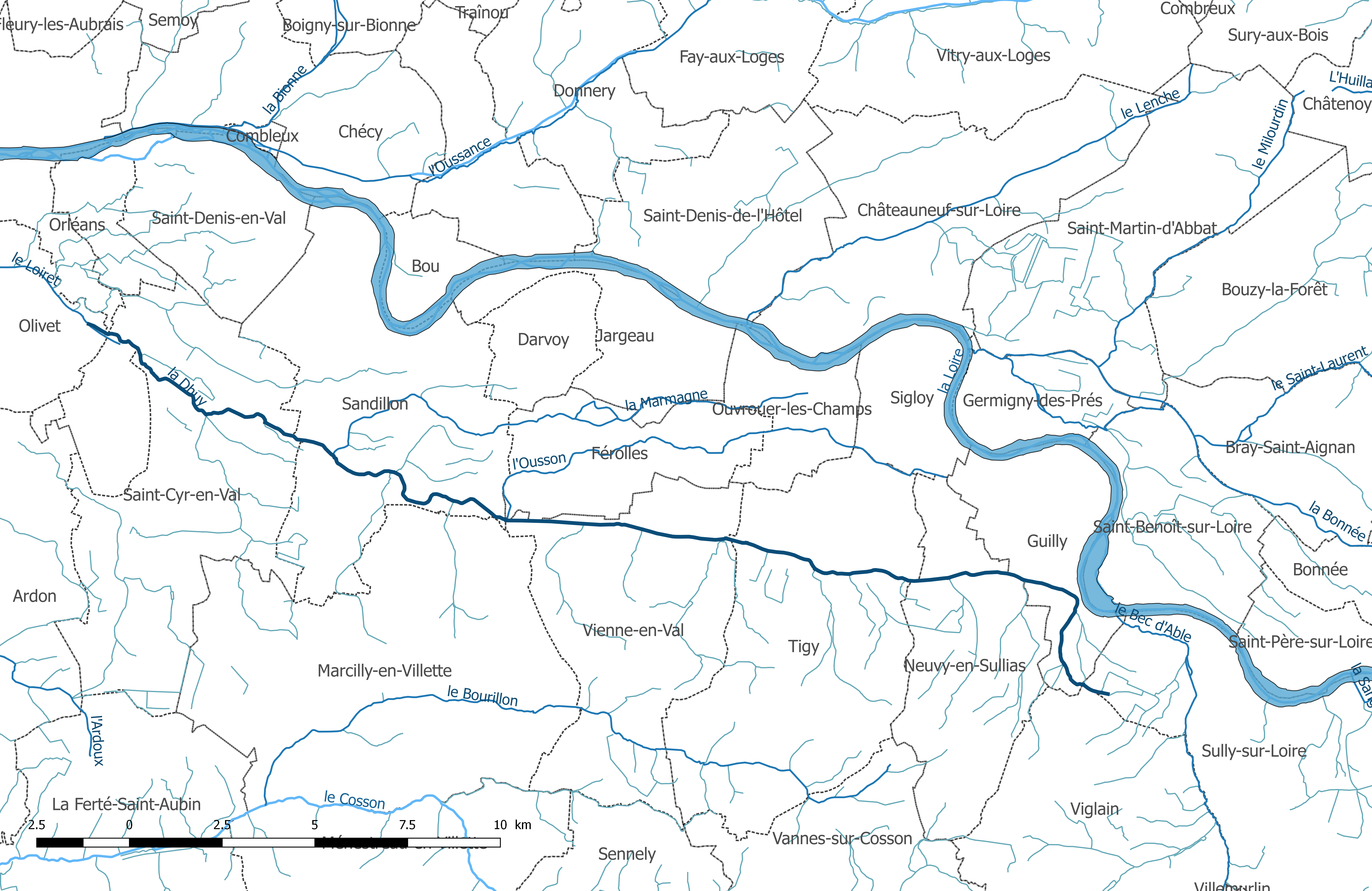 Carte du cours d'eau "la Dhuy" et de ses affluents, dans le département du Loiret.